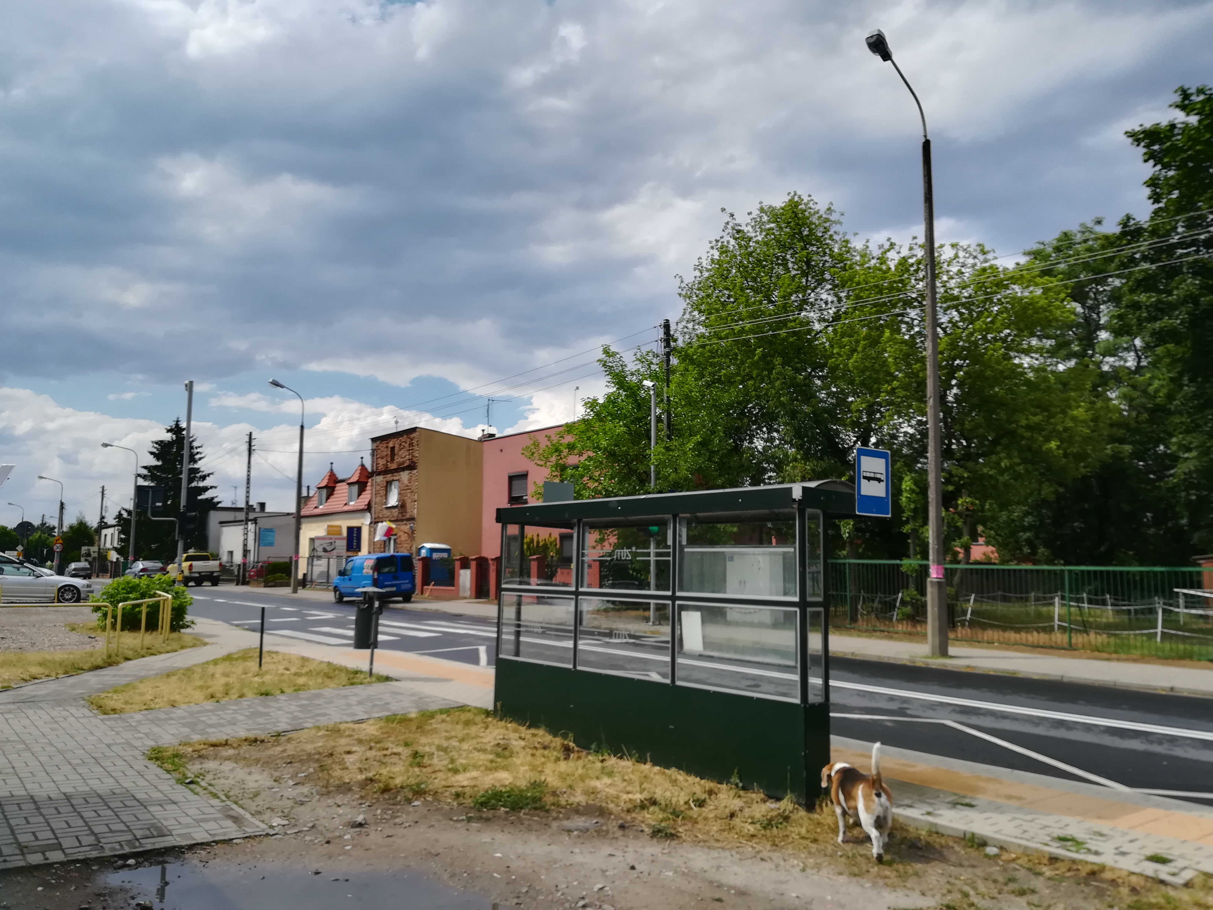 Poznańskie Fabianowo (rejon skrzyżowania ulic Fabianowo i Kowalewickiej).